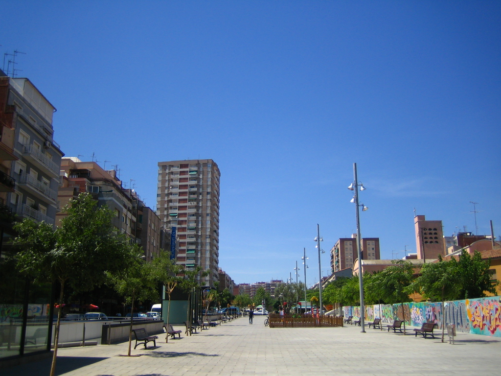 Foto hecha por mi desde la calle primavera hacia el oeste, el jueves 04 de Agosto del 2005 a las 14:02 de la tarde. Con la cámara CANON ixus 40